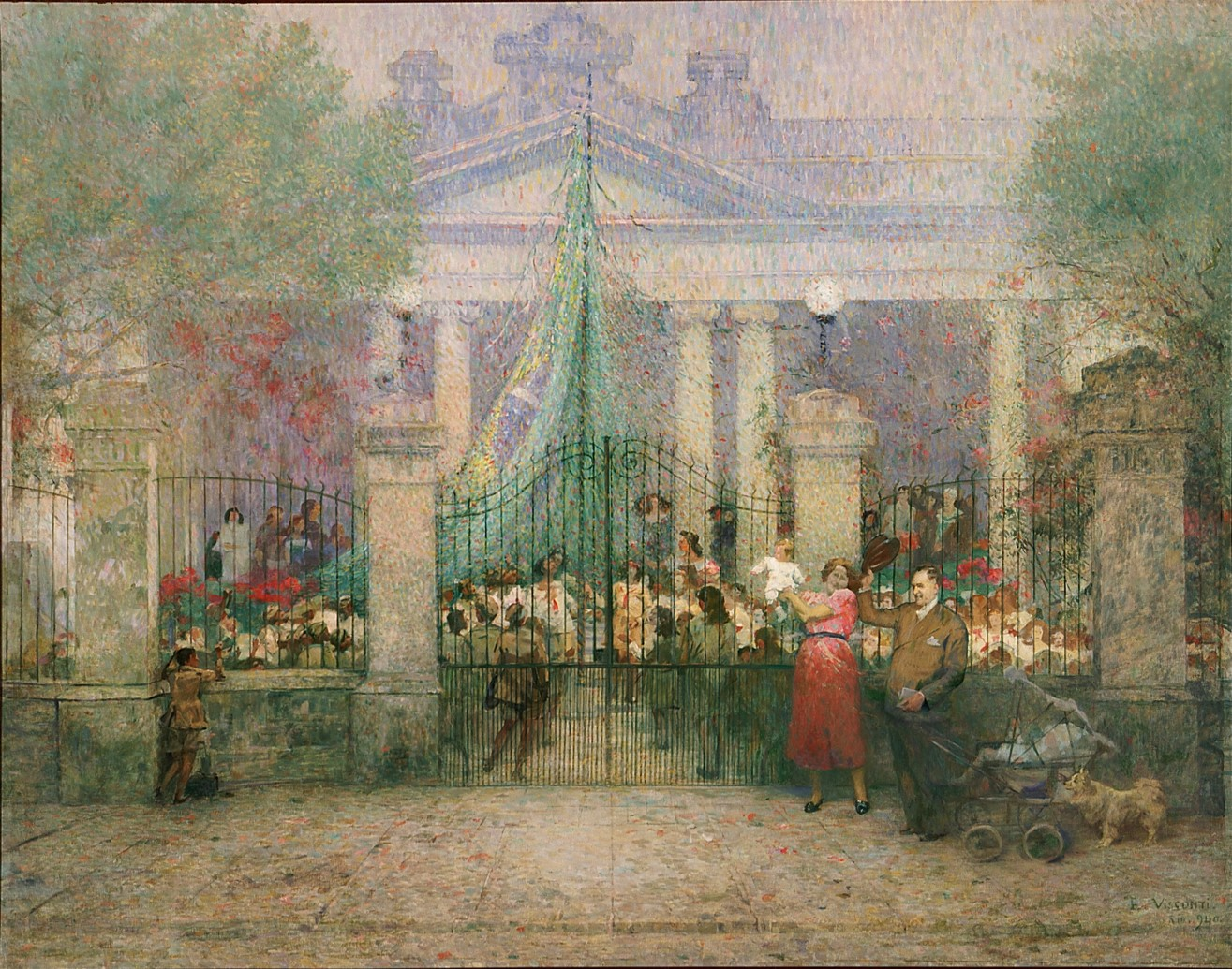 Obra do Projeto Eliseu Visconti